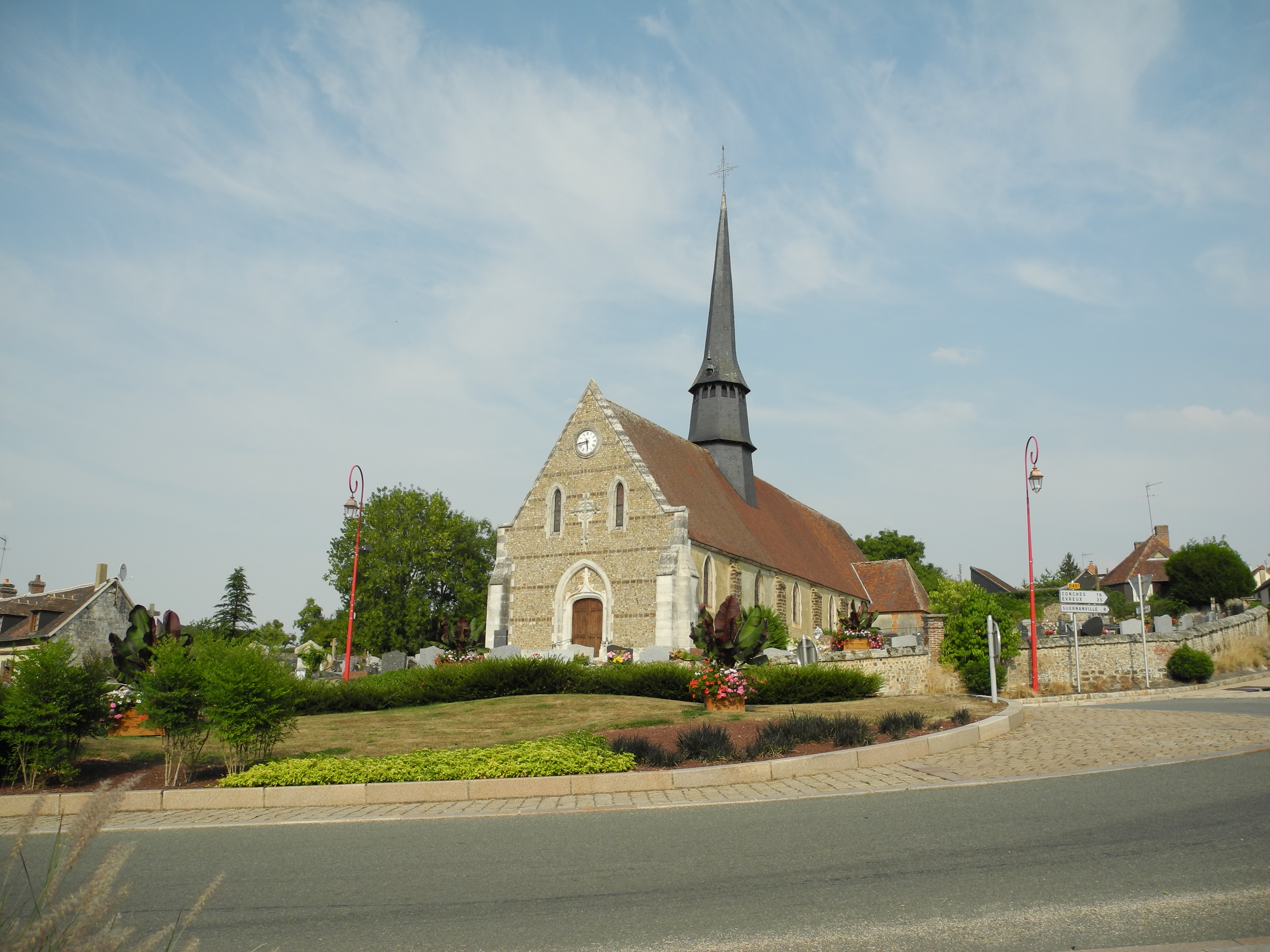 Rond-point et église Saint-Pierre de La Vieille-Lyre - Eure (27330)